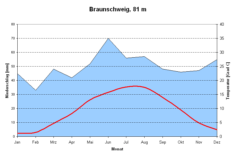 Braunschweig: Klimadiagramm